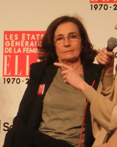 Première Table Ronde : Femmes et pouvoir Avec Anne Lauvergeon (Areva), Mariette Sineau (CEVIPOF), Nathalie Rykiel, Nathalie Kosciusko-Morizet